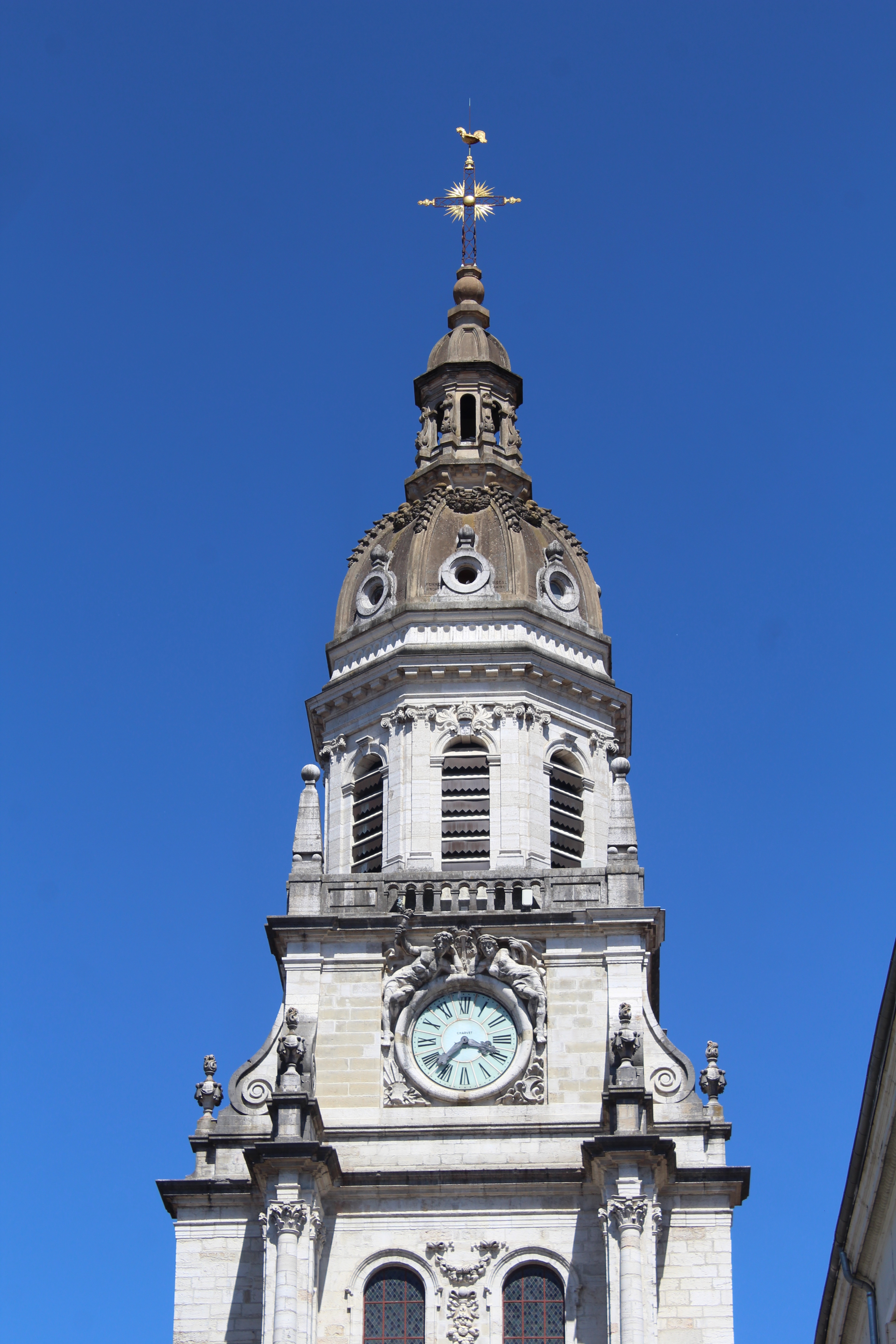 Co-cathédrale Notre-Dame de l'Annonciation de Bourg-en-Bresse.